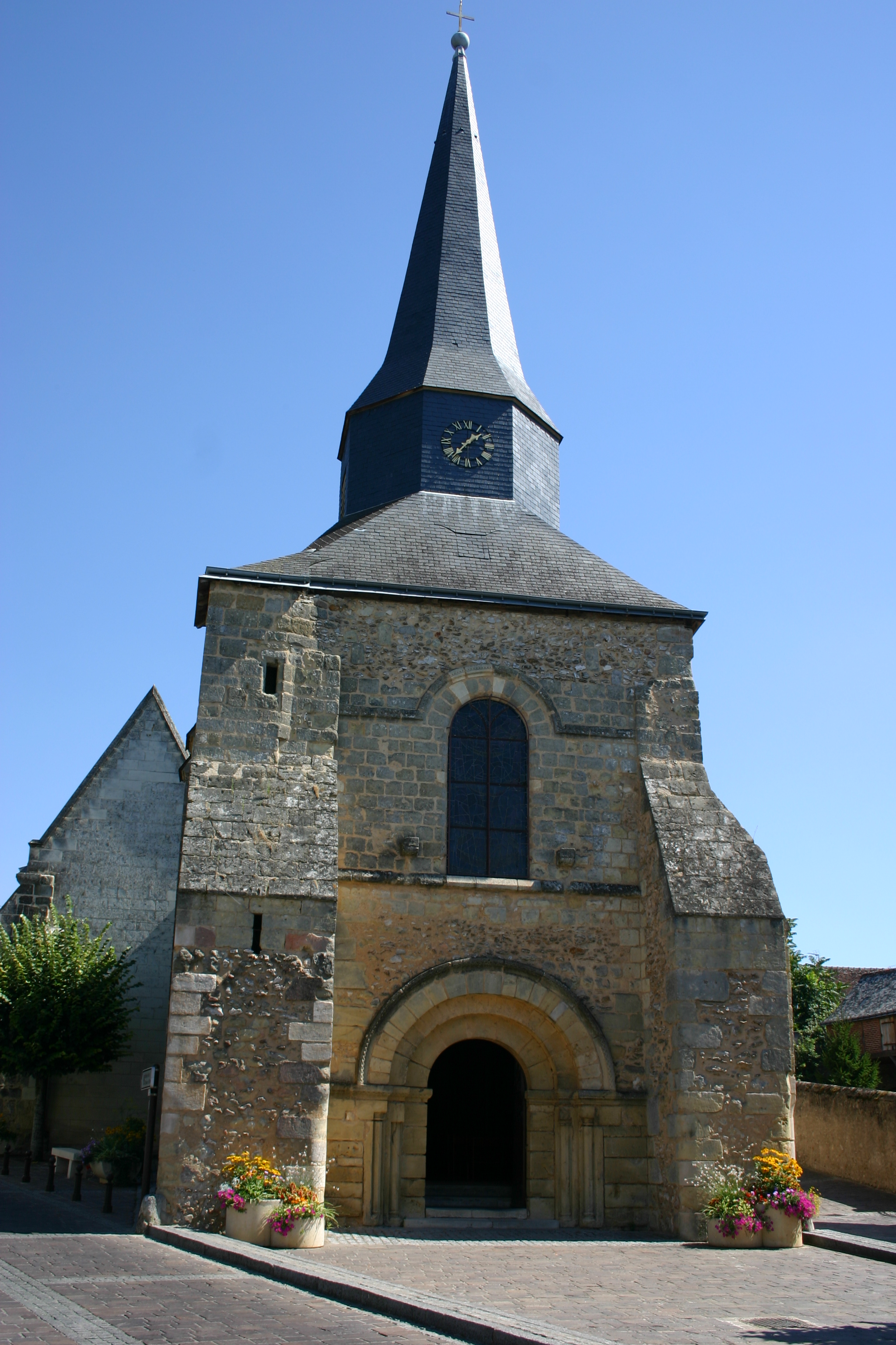 Eglise de Ballan-Miré. Céréales Killer â˜º 9 septembre 2005 à 17:53 (CEST)